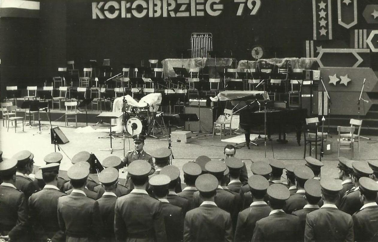 Kołobrzeg, 1979r. Kompania śpiewu Garnizonu Stargard Szczeciński podczas Festiwalu Kołobrzeskiego pod batutą kapelmistrza st. sierż. szt. Gerarda Jędrzejewskiego